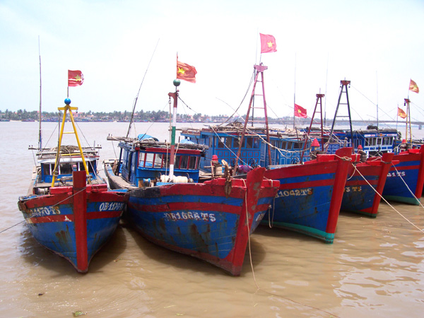 Fishing boats in Dong Hoi, Quang Binh